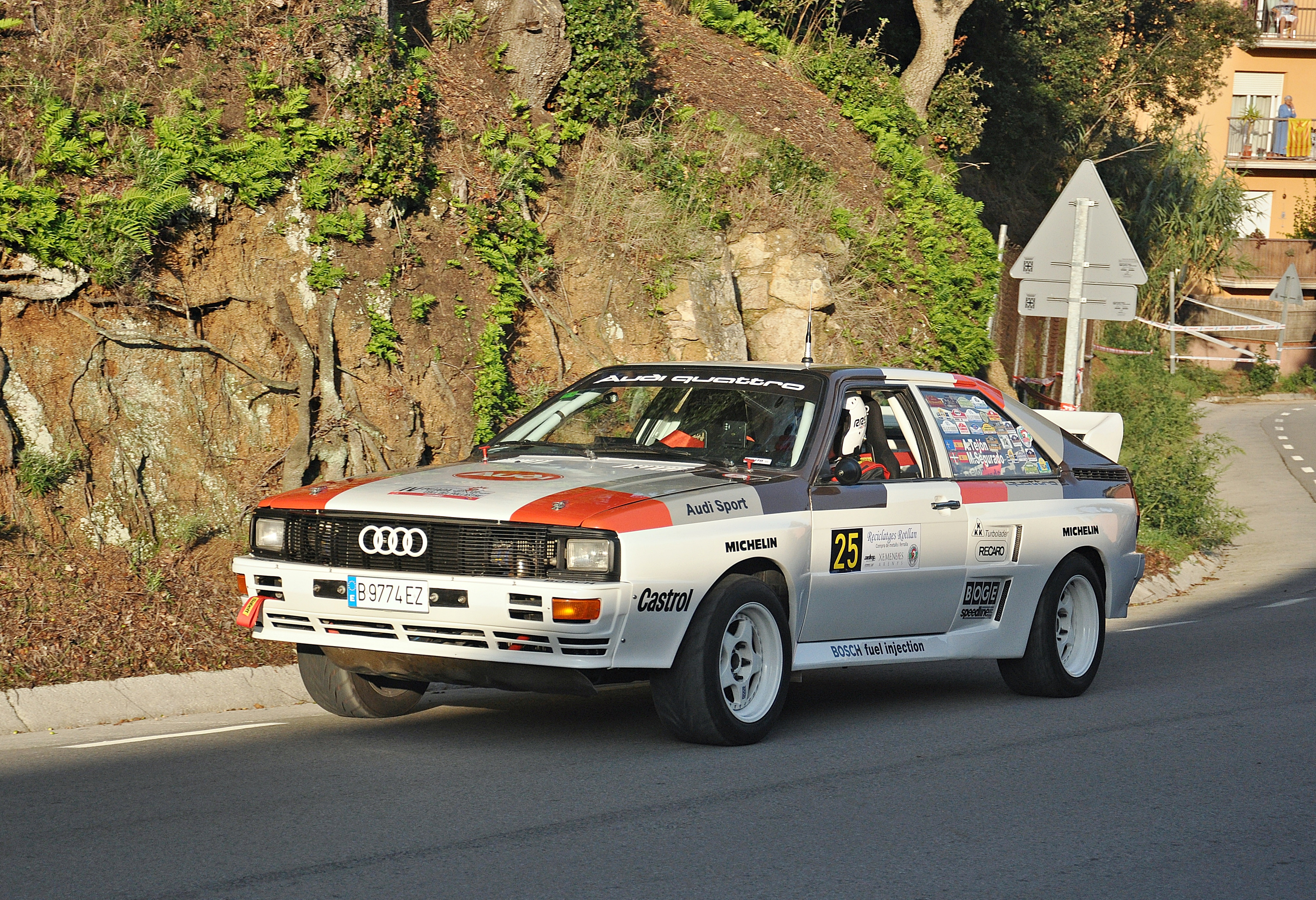 IV Pujada al Coll del Pollastre